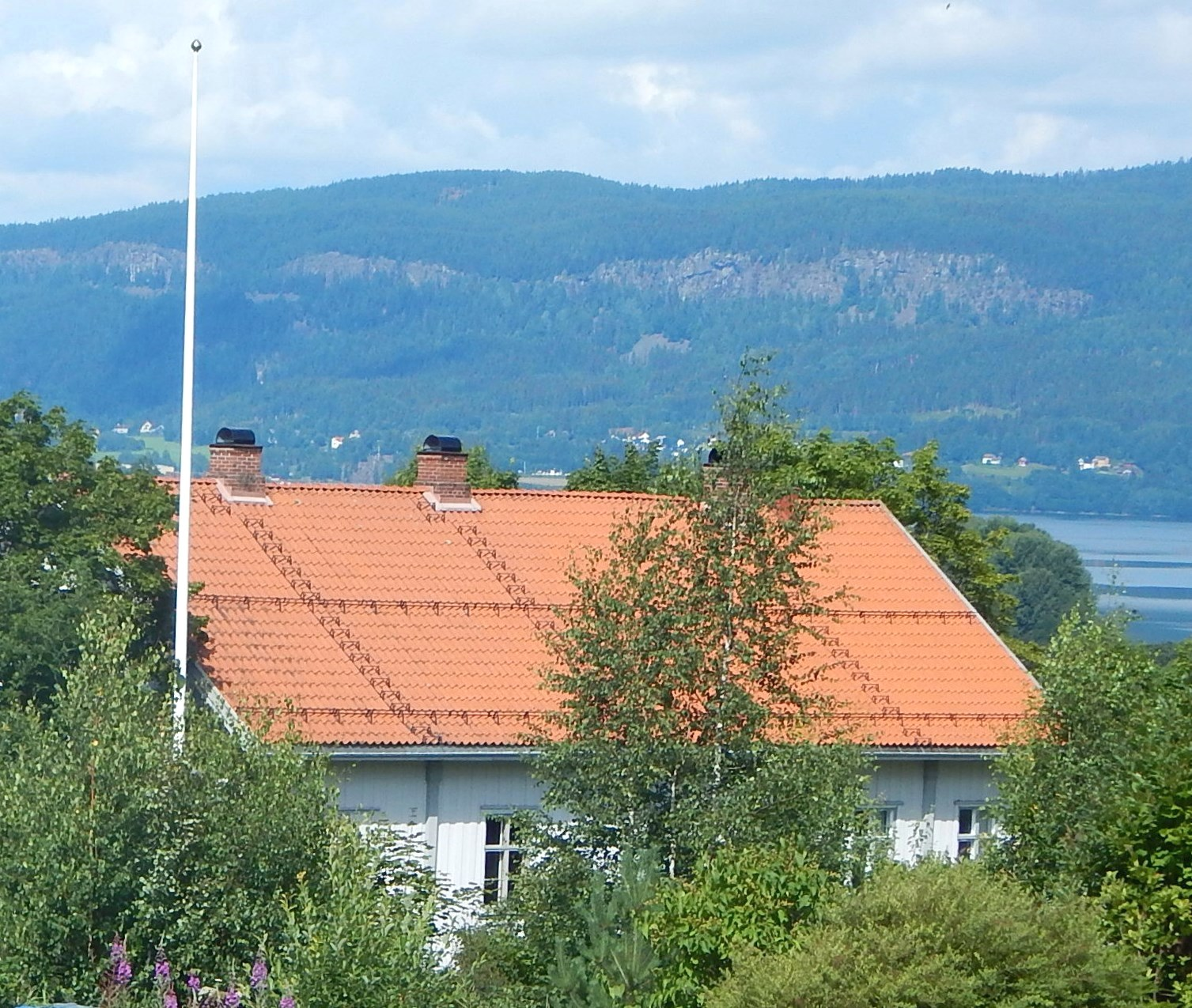 Søndre Land (Fluberg) prestegård